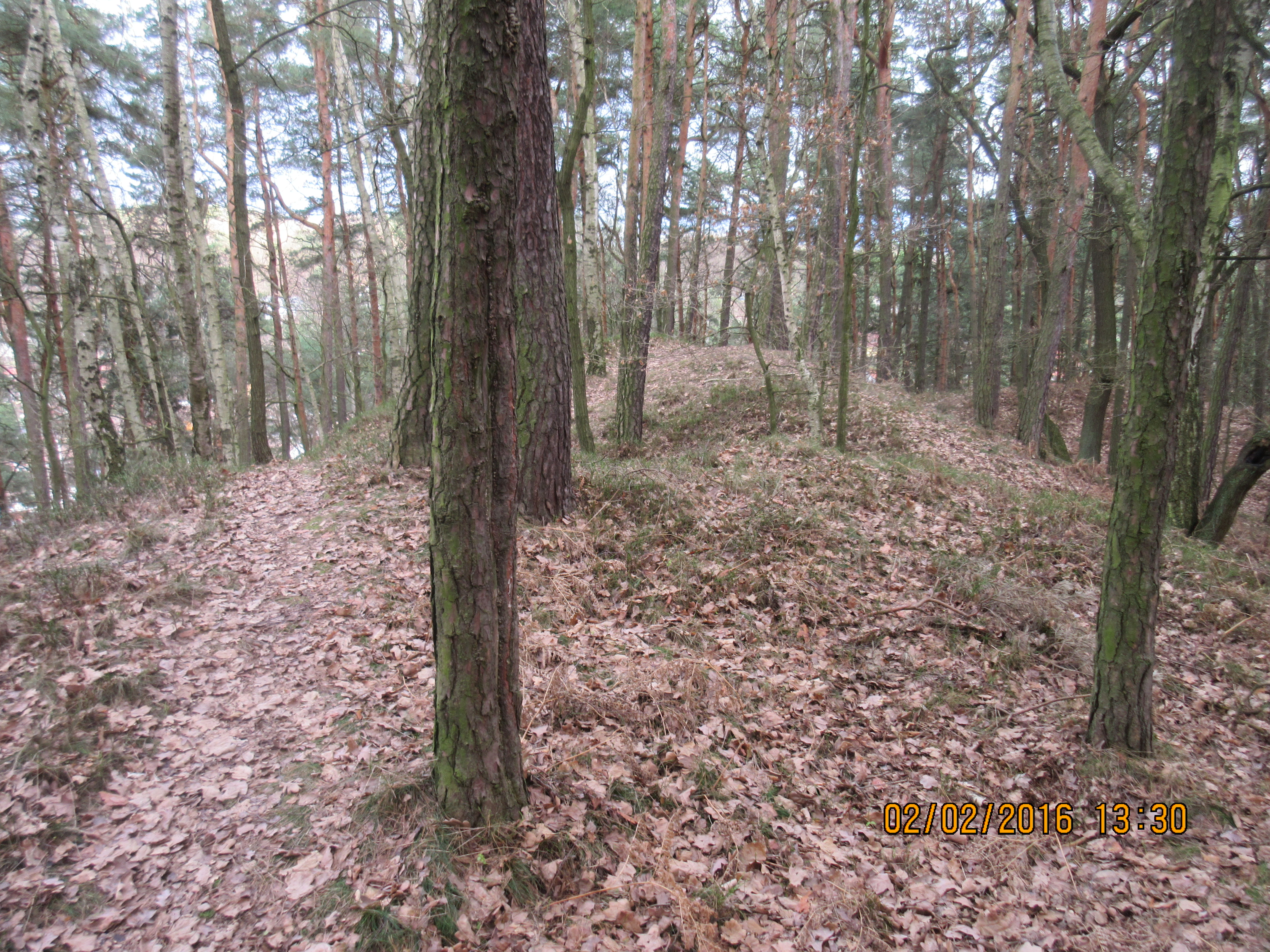 Vrcholová partie kopce na kraji čtvrti Svárov